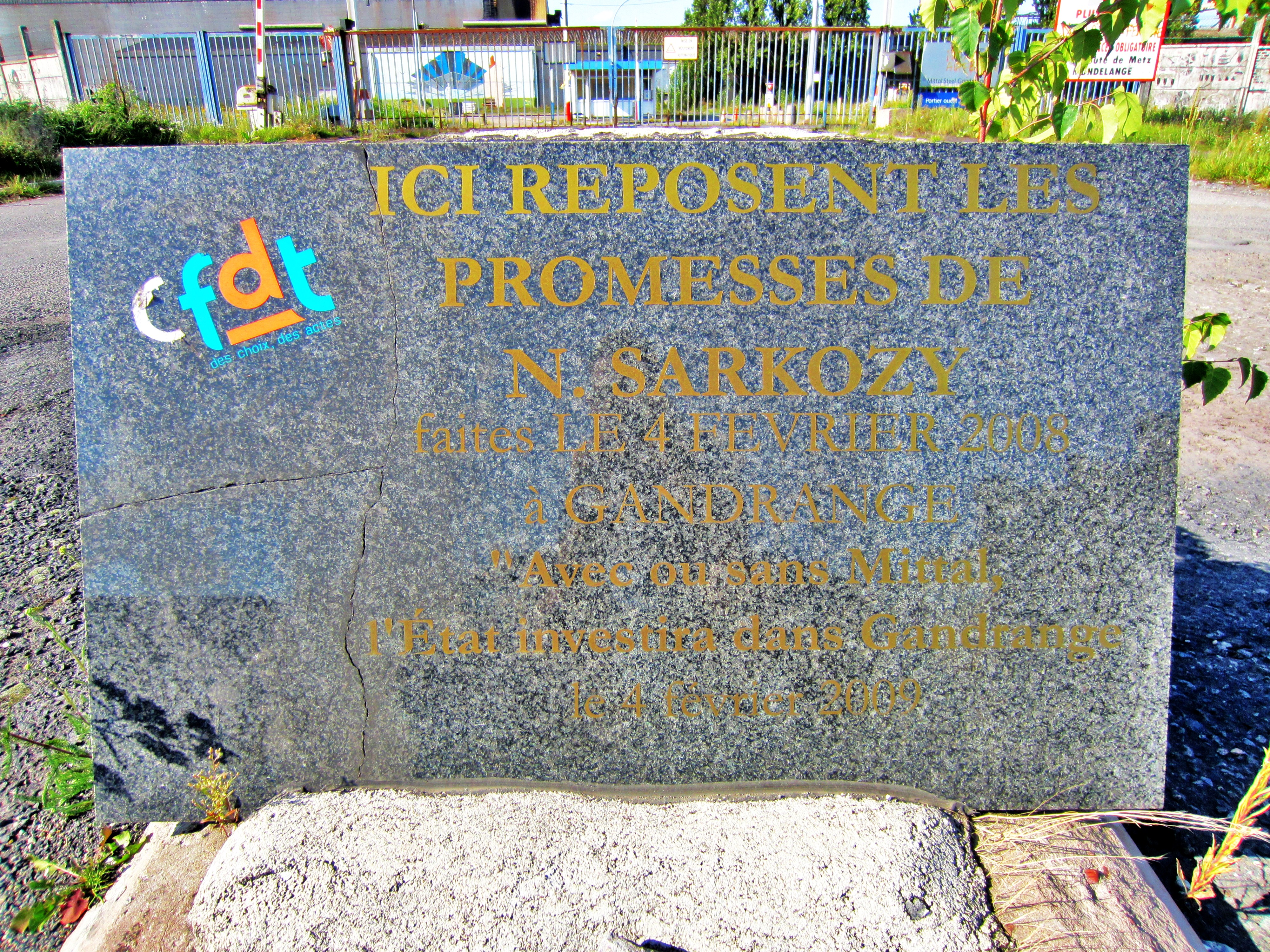 Texte: Ici reposent les promesses de N. Sarkozy faites le 4 février 2008 à Gandrange "Avec ou sans Mittal, l'État investira dans Gandrange" le 4 février 2009 Description stele acierie Gandrange Date11 January 2012Sourcemon appareil photoAuthorAimelaimePermission (Reusing this file) stele acierie Gandrange